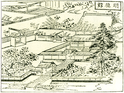 秋田の歴史改訂版に掲載の絵図